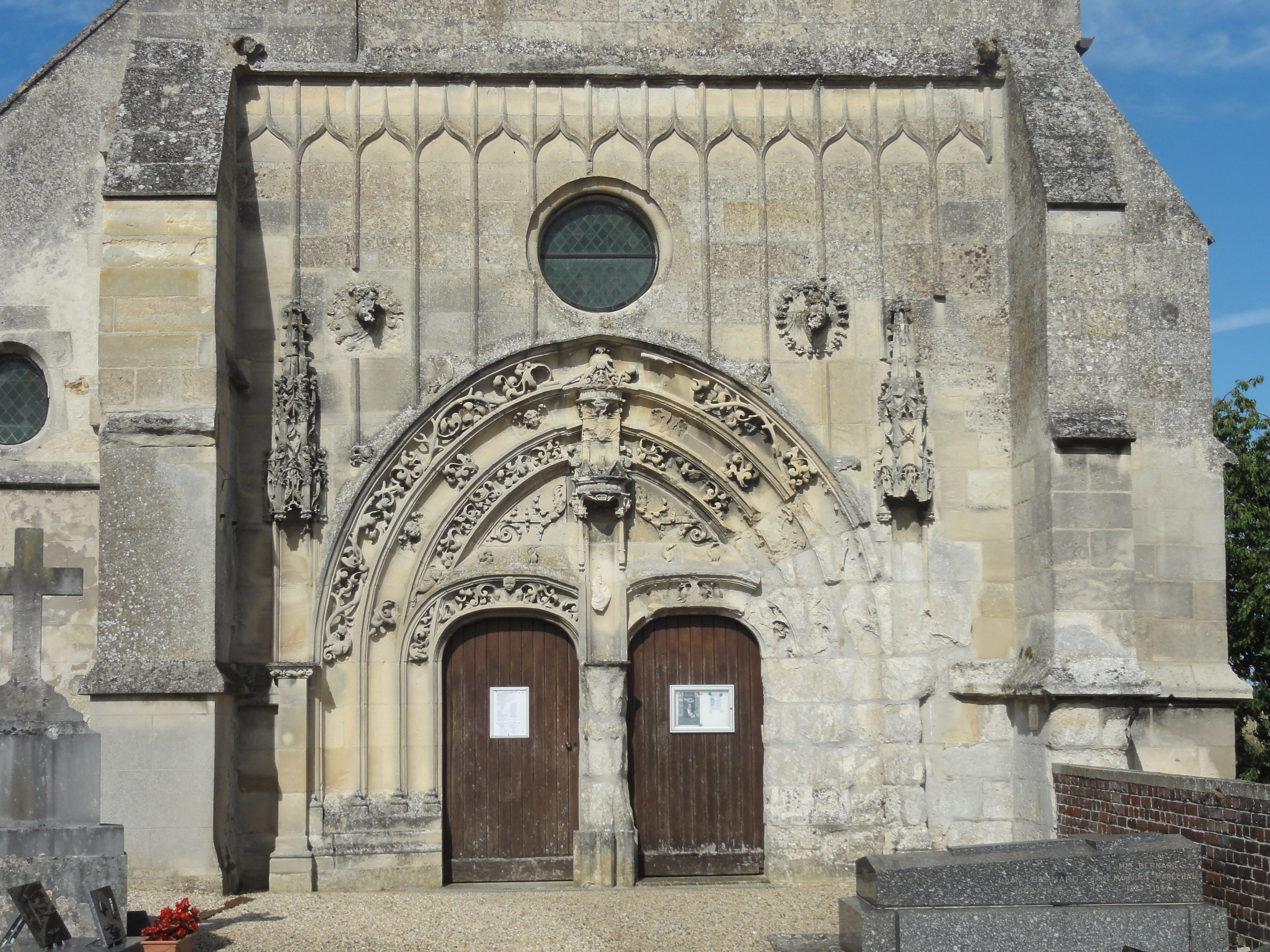 Vue rapprochée de la façade occidentale richement ornée de décors flamboyants.